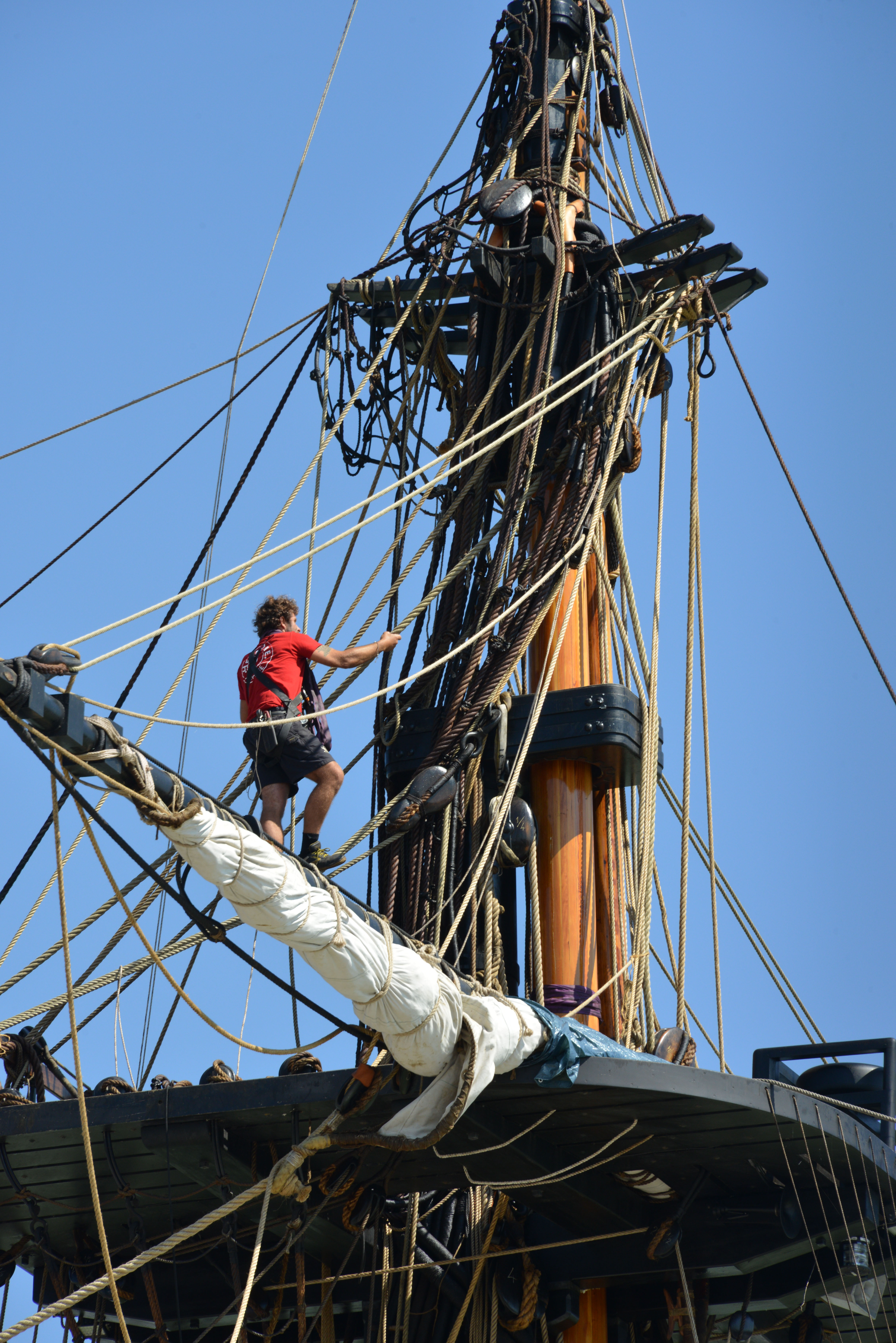 La frégate "L'Hermione" amarrée dans le port de commerce de Rochefort, avant sa première descente de la Charente vers la mer. Le gabier descend du mât de misaine. Rochefort-sur-Mer, Charente-Maritime, France.